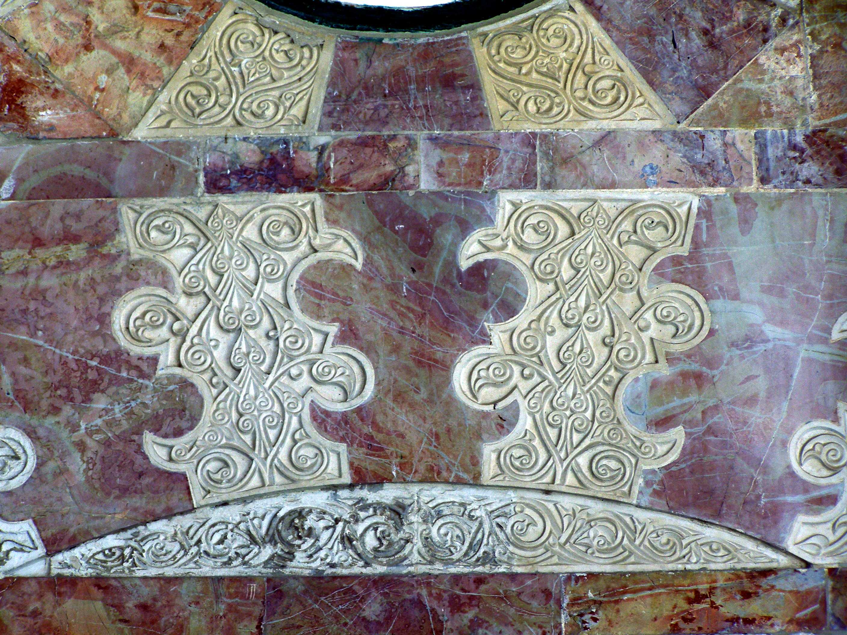 Temple Mount, Jerusalem Madrassat Al Ashraffiyya